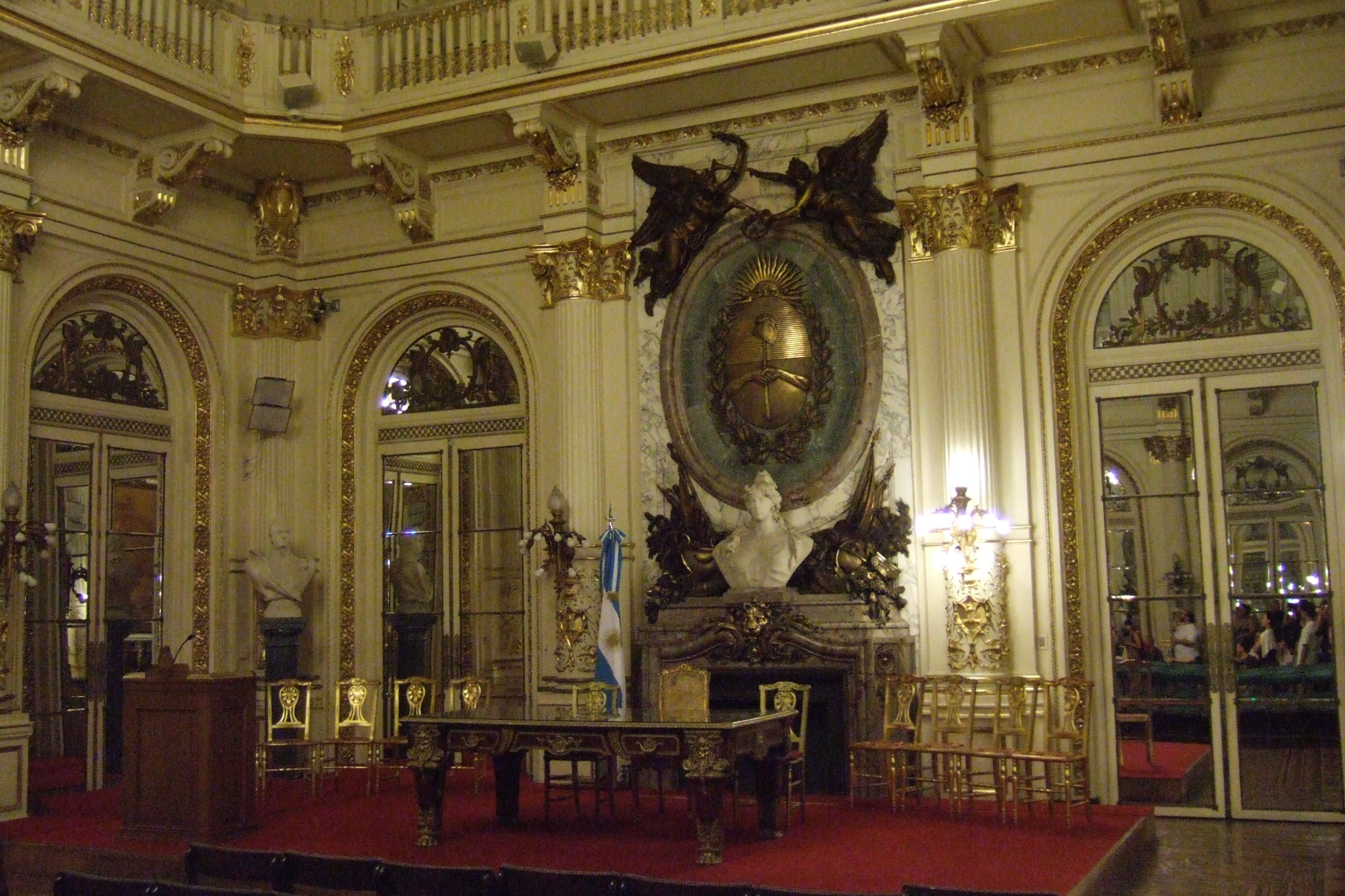 阿根廷总统府白厅